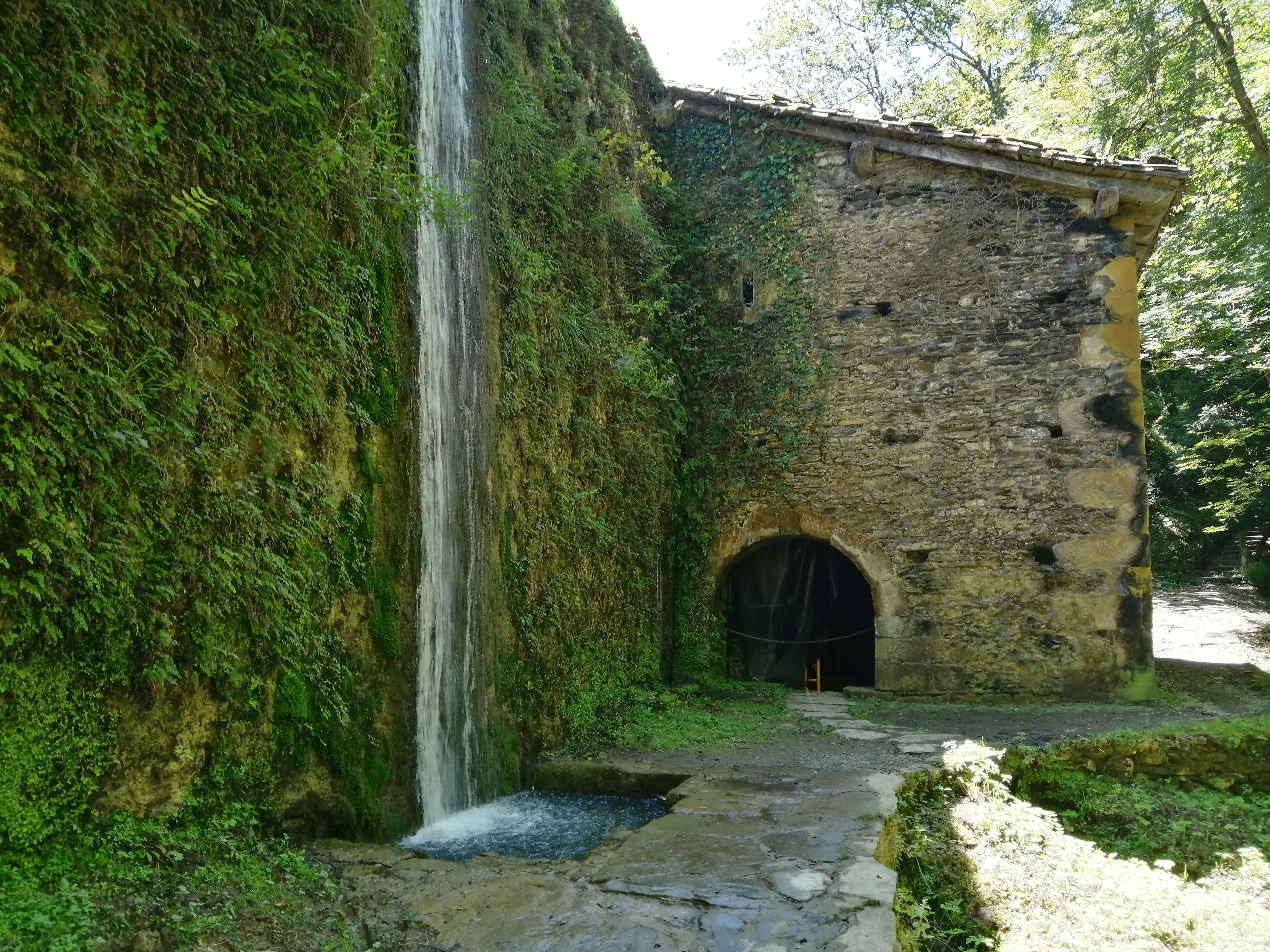 Agorregi Burdinola Pagoetan, Aian